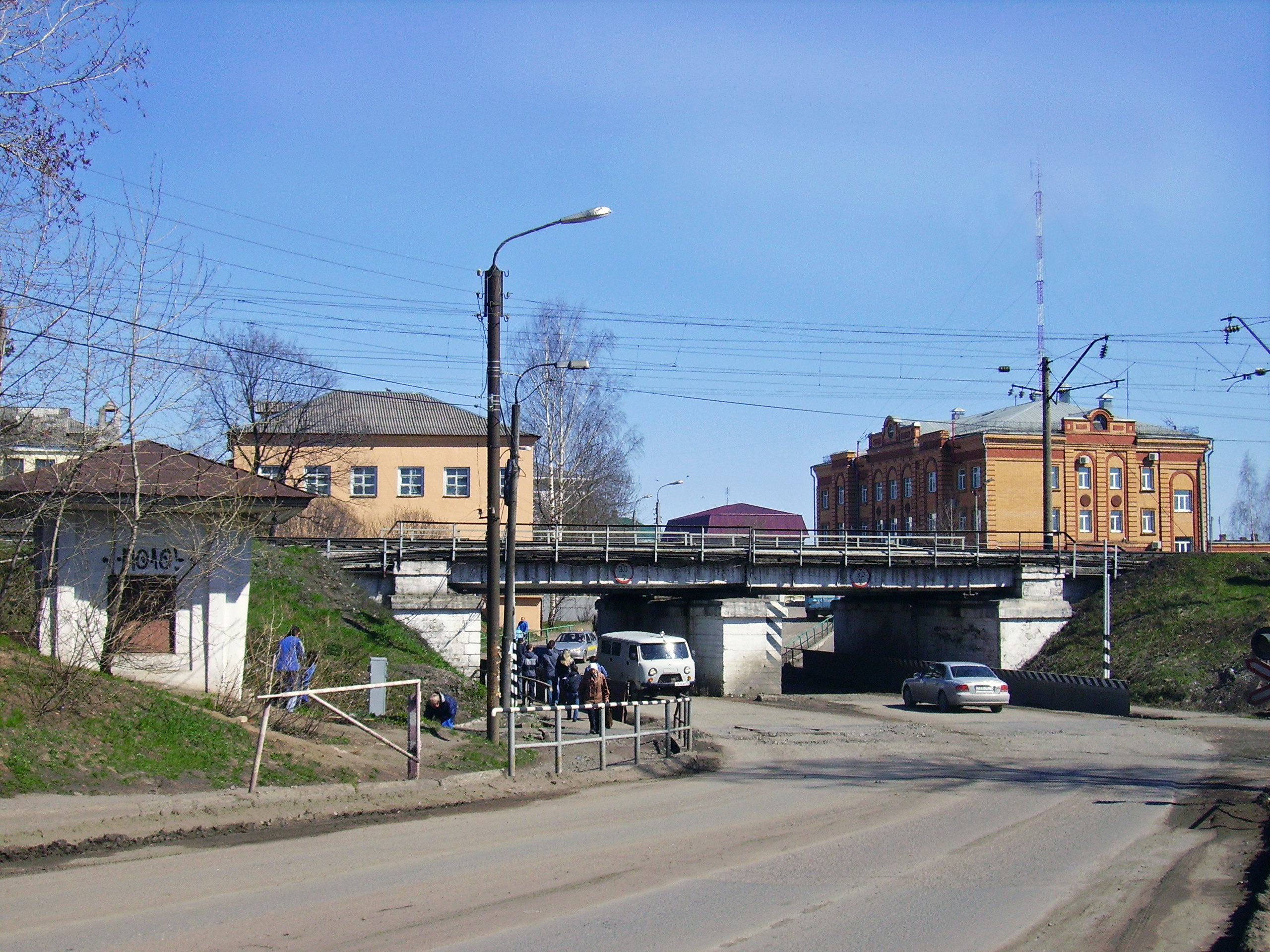 Котельнич. У перекрёстка улиц Советской и Прудной